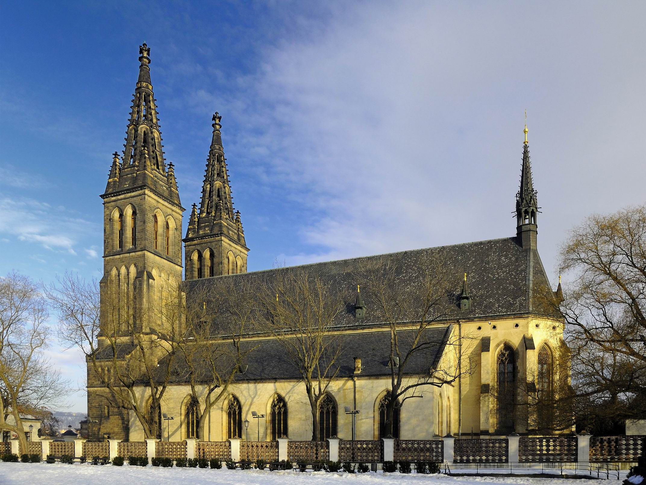 Pevnost Vyšehrad, Praha 2-Vyšehrad, Soběslavova 14/1, V pevnosti 16/2, 35/11, K rotundě 16/3, 81/6, 82/8, 90/12, 91/14, 92/16, 100/10, Štulcova 89/1, 102/2, 69/3